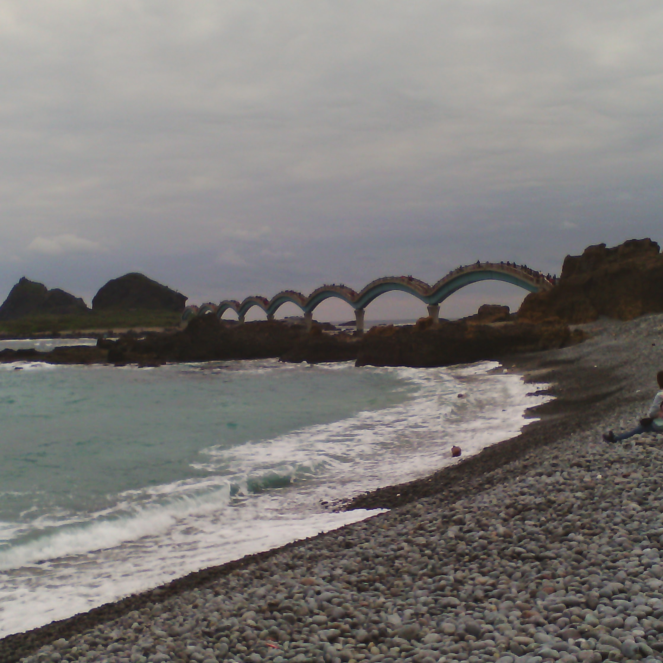 OmateTrueSmart測試拍照功能，於臺東八仙橋